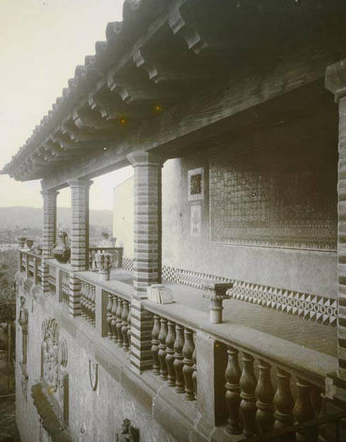 Imatge